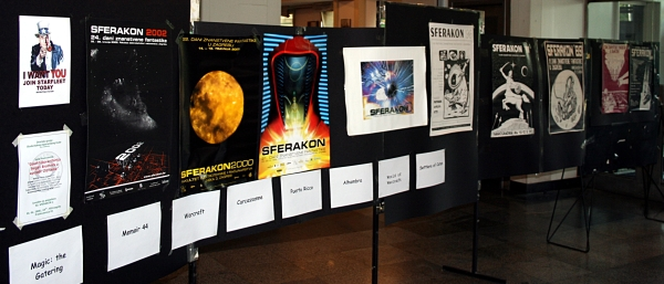 Ulaz na SFeraKon u Zagrebu